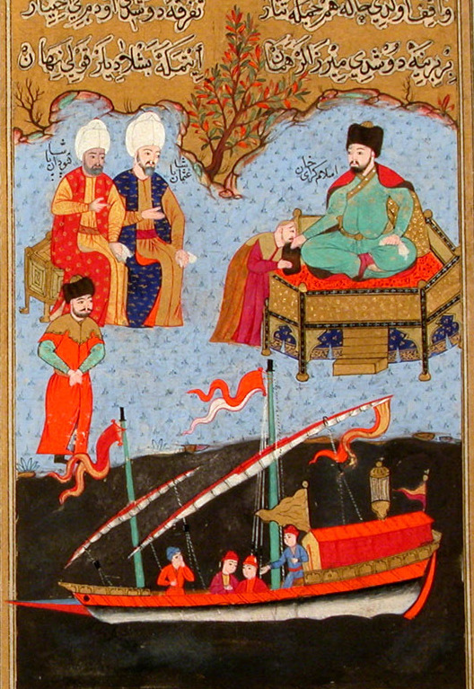 Secaatname 0217